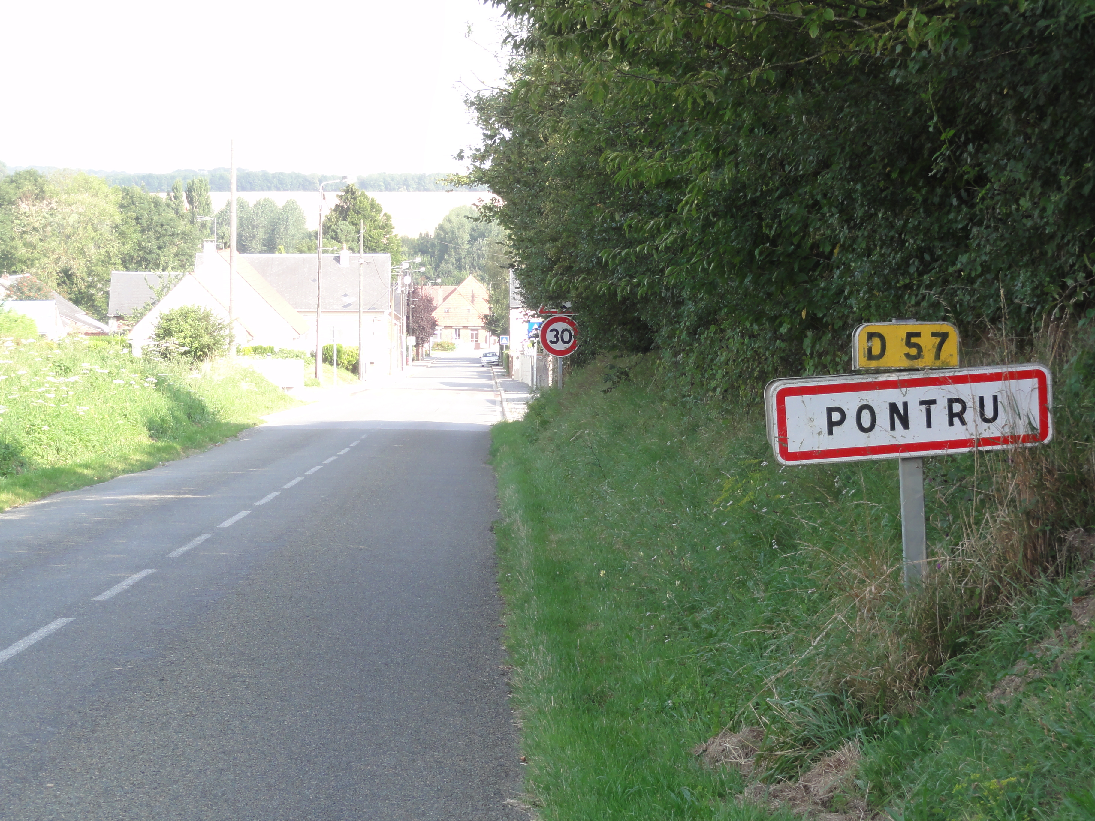 Pontru (Aisne) city limit sign